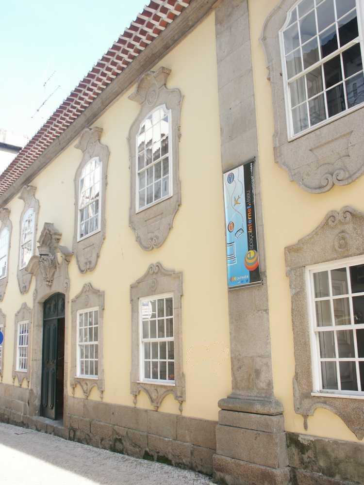 Espaço Internet de Viseu